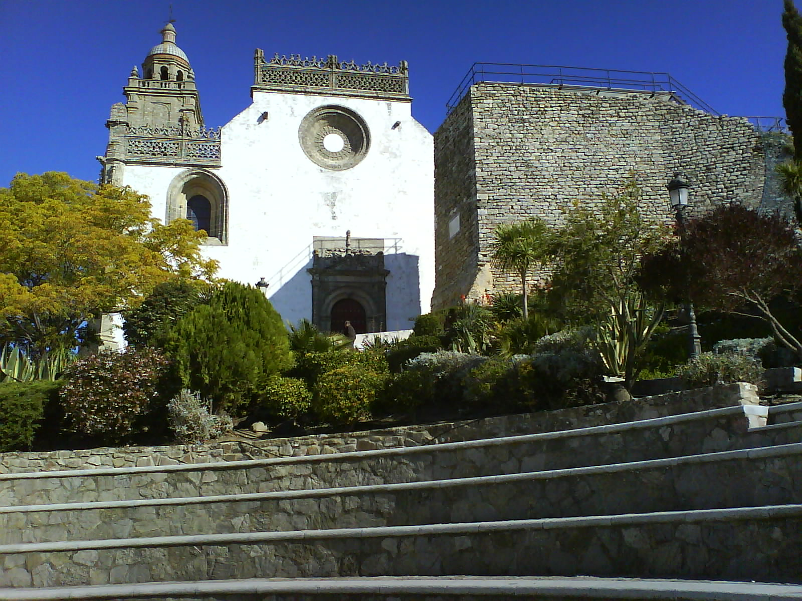 Fachada principal de la Iglesia Mayor de Santa María la Coronada. En Medina Sidonia (Cádiz)